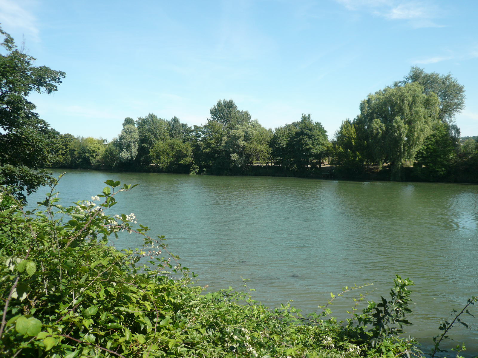 Vue de l'Oise depuis le parc des impressionistes